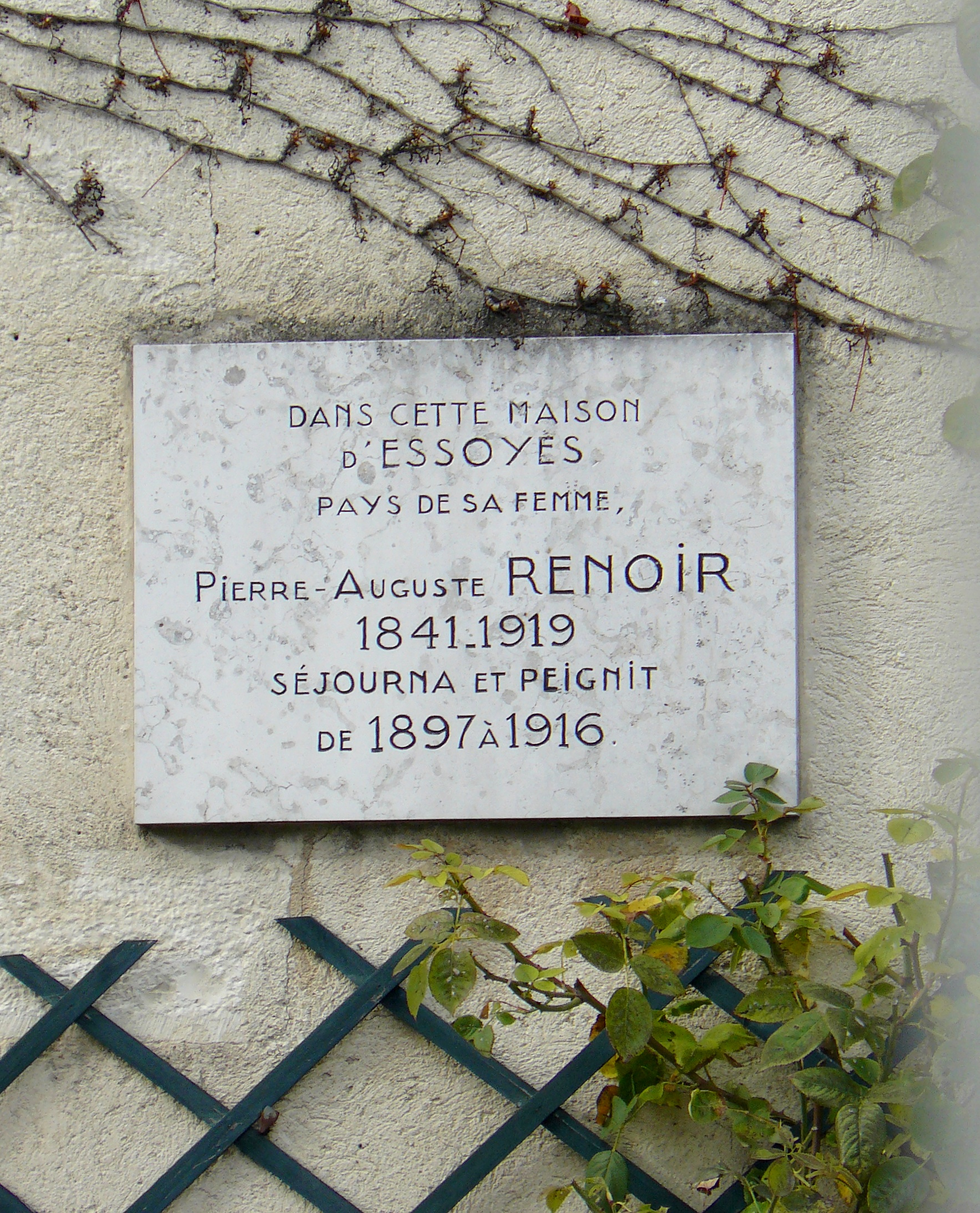 Essoyes (Aube, France), plaque sur la maison de Pierre-Auguste Renoir.